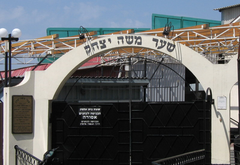 Umaňská synagoga.